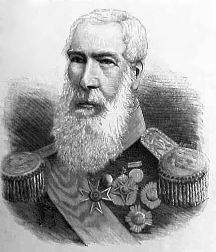 Admiral of the Fleet Sir George Rose Sartorius, GCB, first Conde de Penha Firme, first Visconde de Piedade, first Visconde de Mindelho - Obituário - Revista Ocidente - Lisboa - século XIX